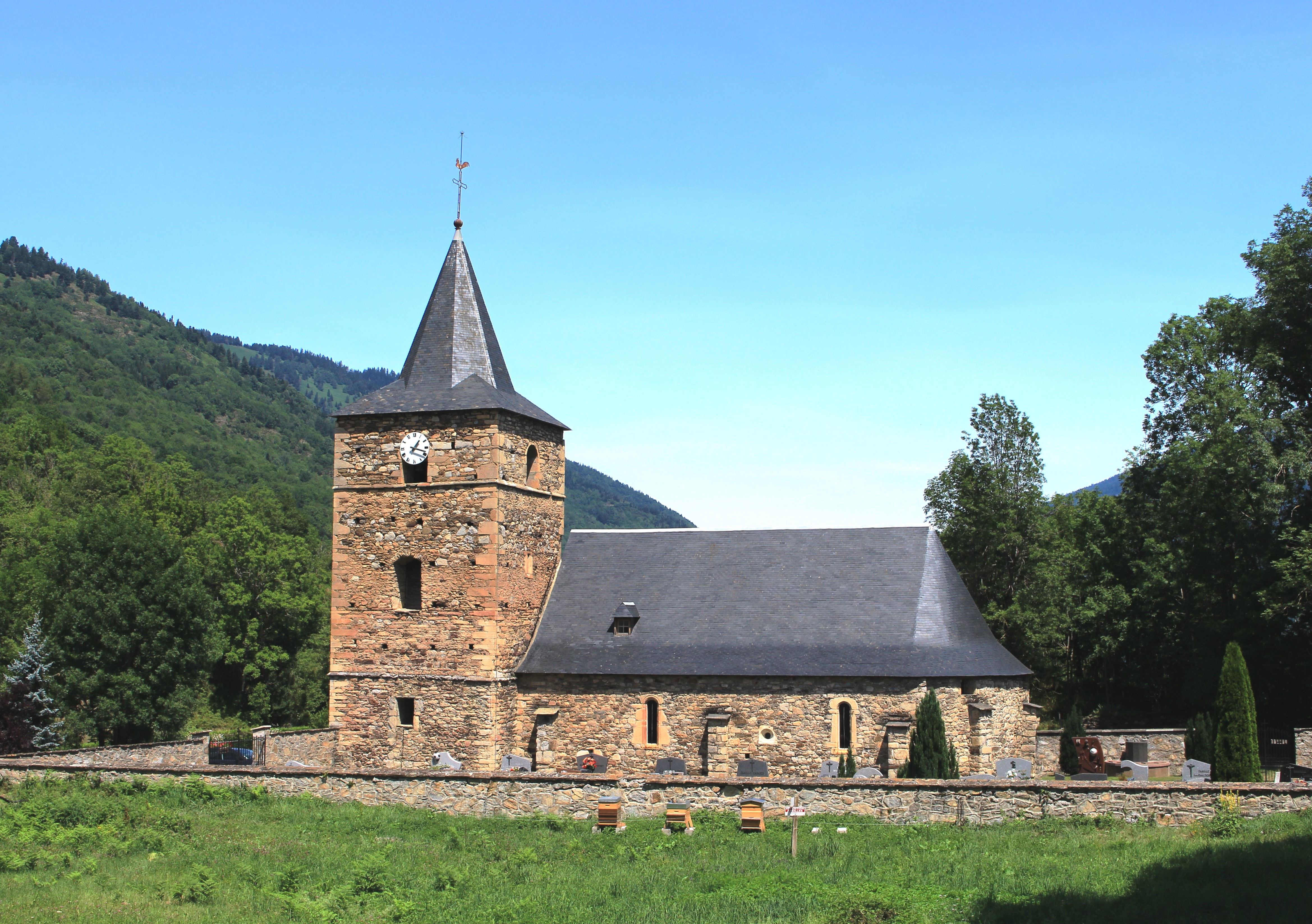 Église Saint-Vincent de Génos (Hautes-Pyrénées)